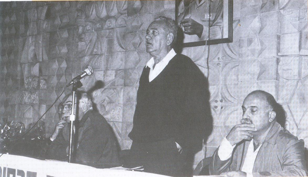 חיים מולכו נועם